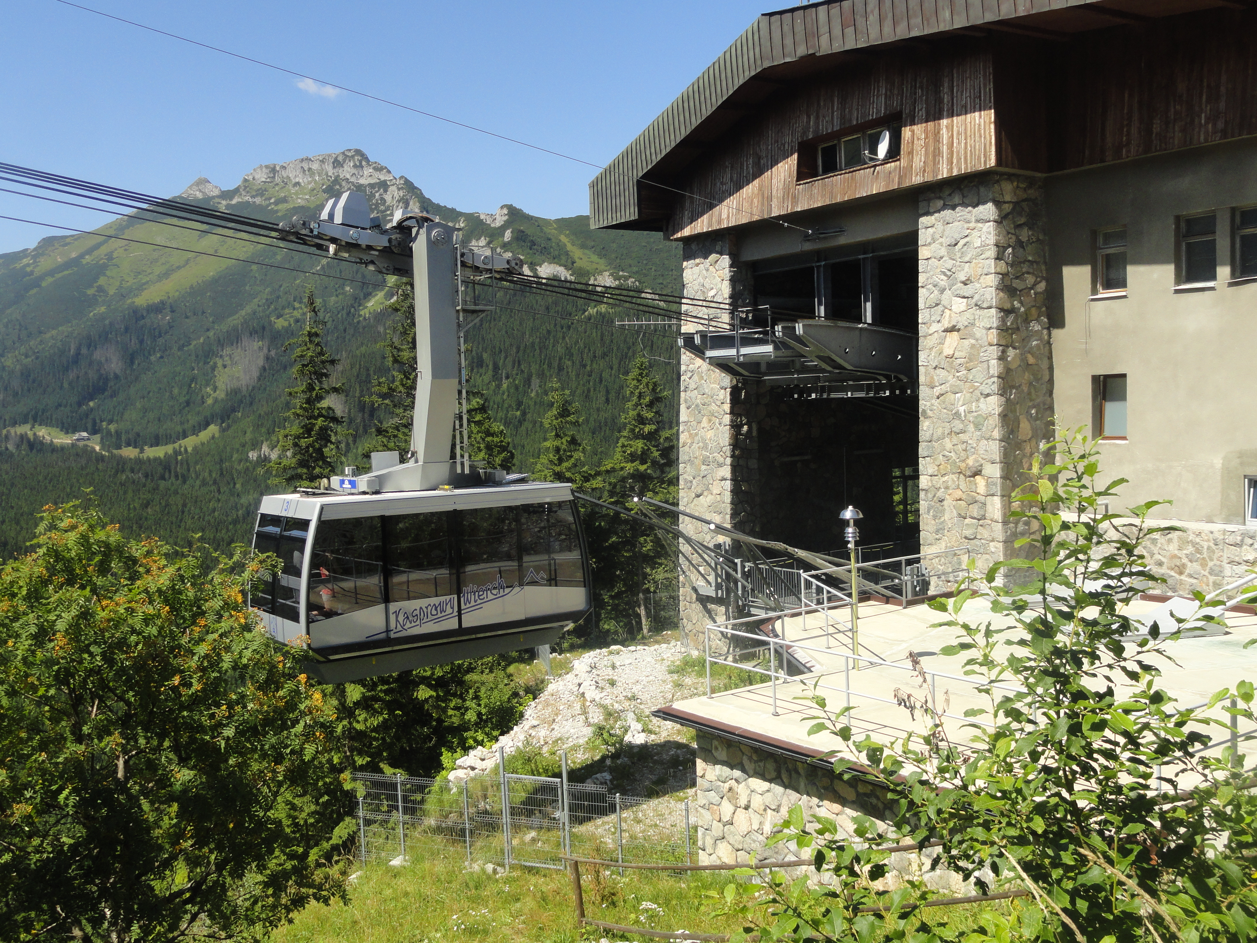 Kolejka linowa wyjeżdżająca w kierunku szczytu Kasprowego Wierchu ze stacji pośredniej na Myślenickich Turniach.